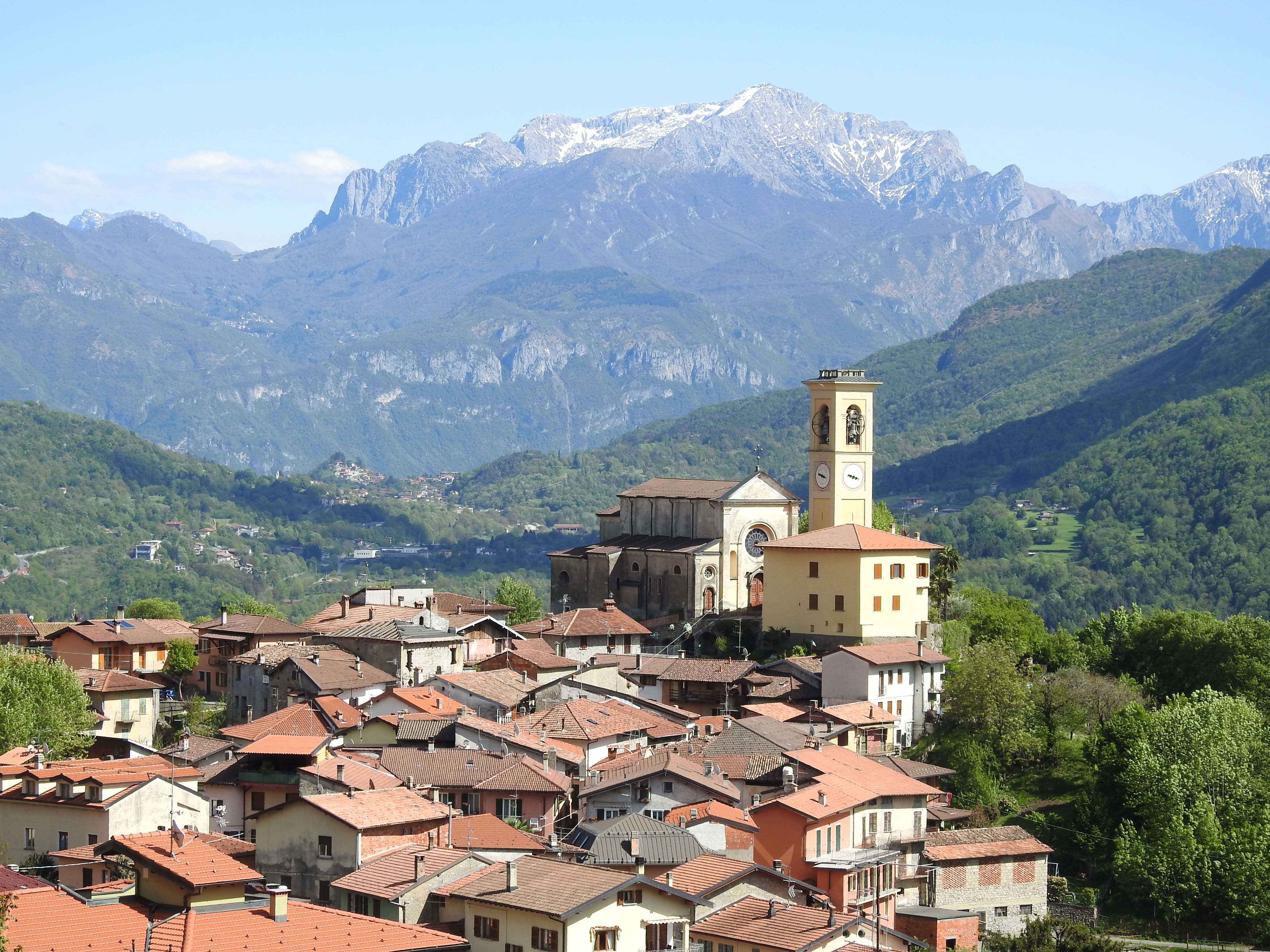 Vesetto von Nordwesten, Corrido